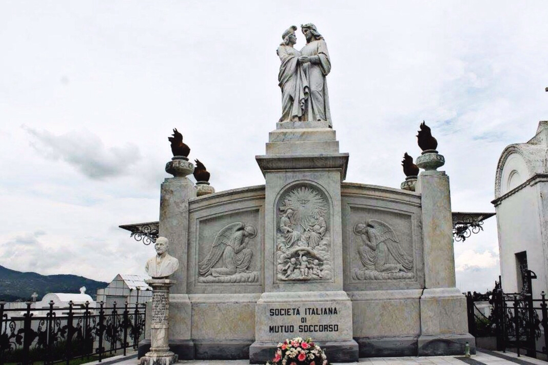 Fotografía actual del Mausoleo Italiano en el Cementerio General de San José, Costa Rica.